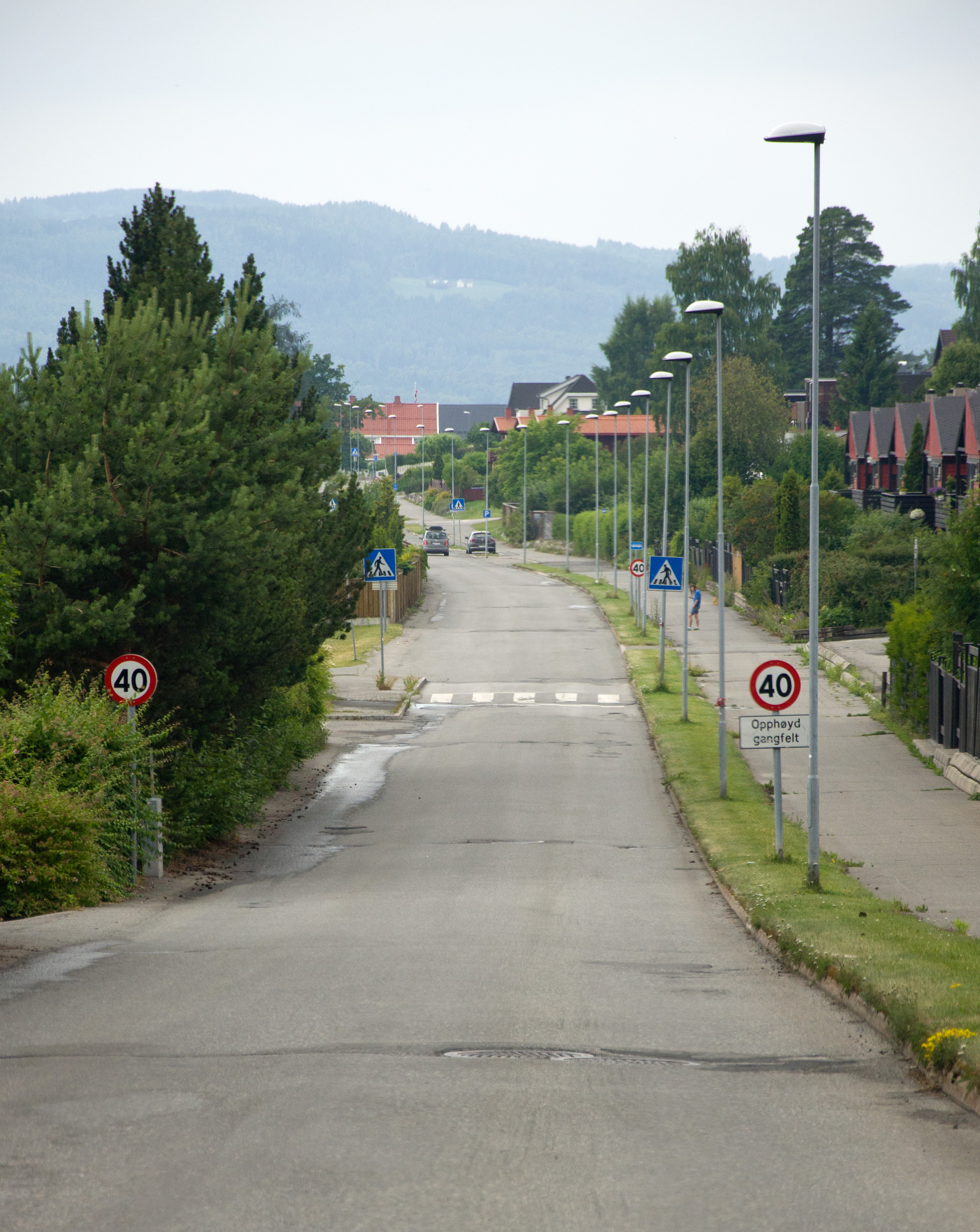 Hedmarks fylkesvei 76, Furubergvegen i Hamar